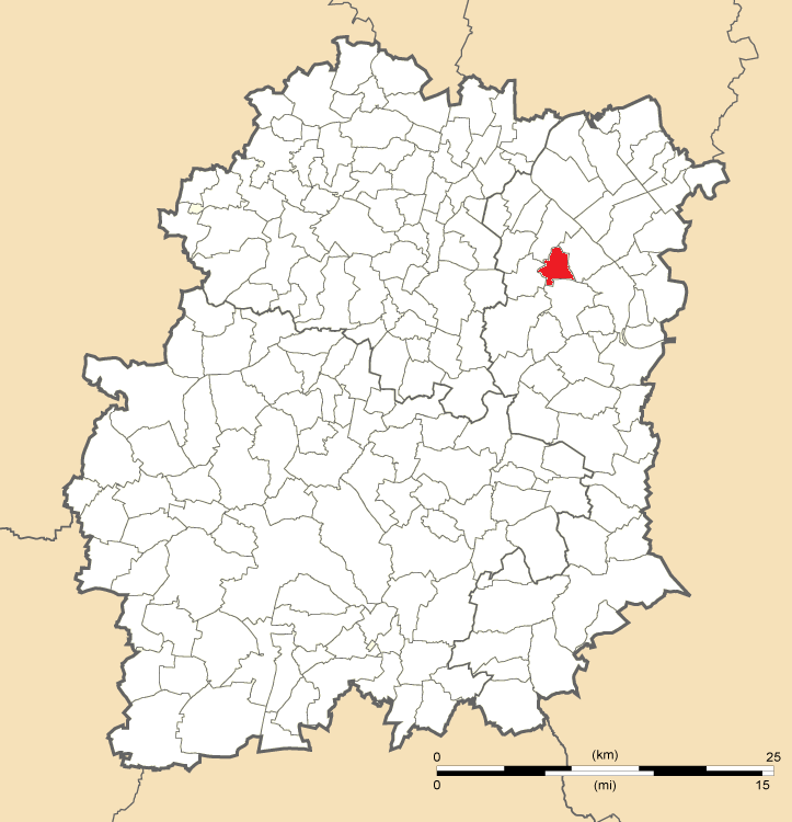 Carte de position de Courcouronnes en Essonne (91)